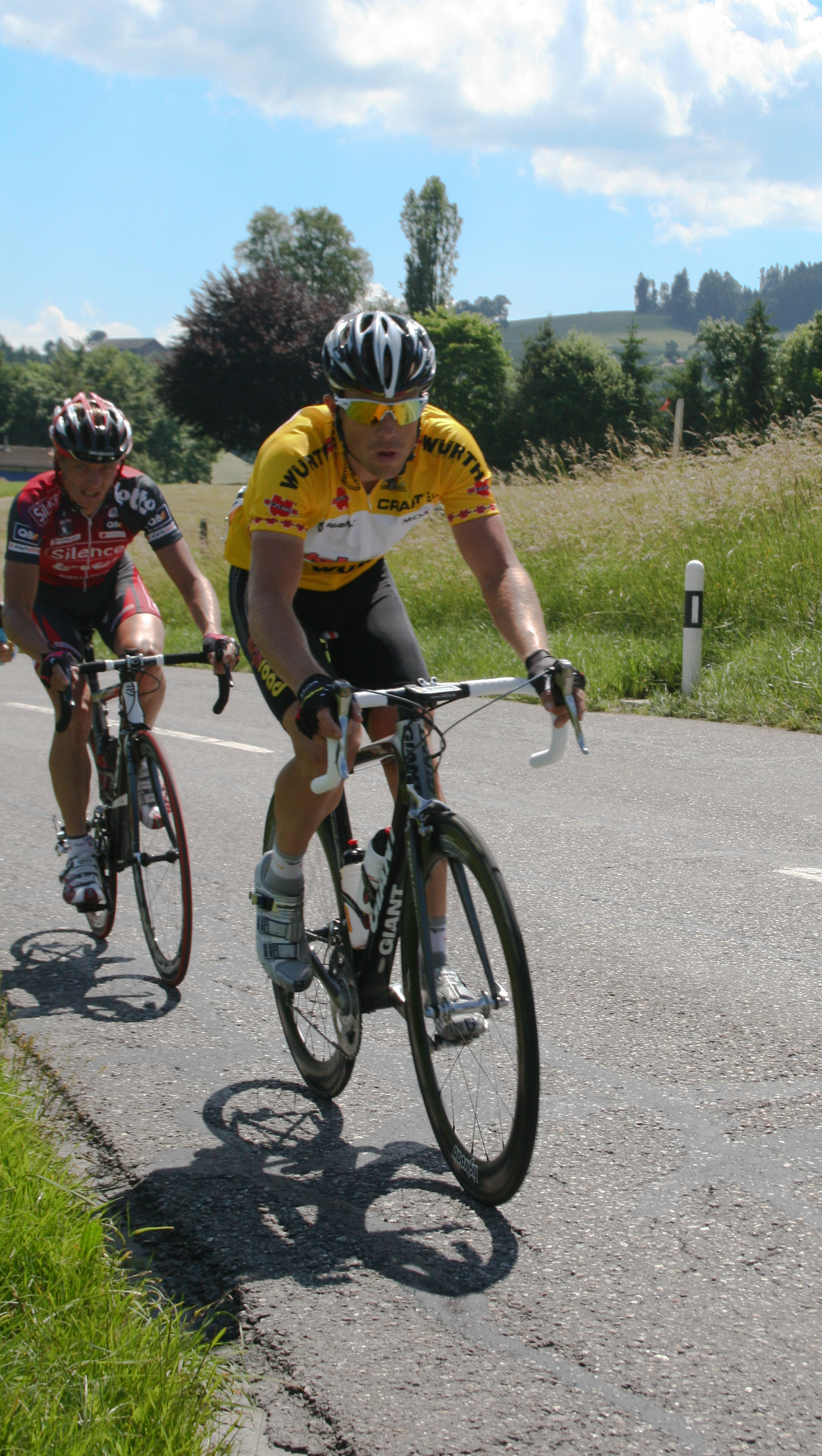 Kim Kirchen leader du Tour de Suisse 2008 au cours de la 7ème étape Gruyères-Lyse